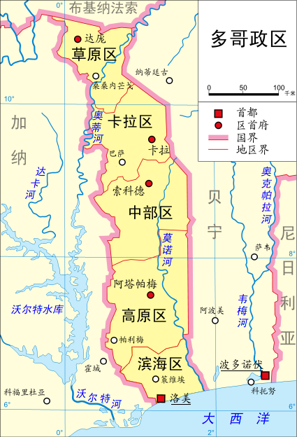 多哥政区。